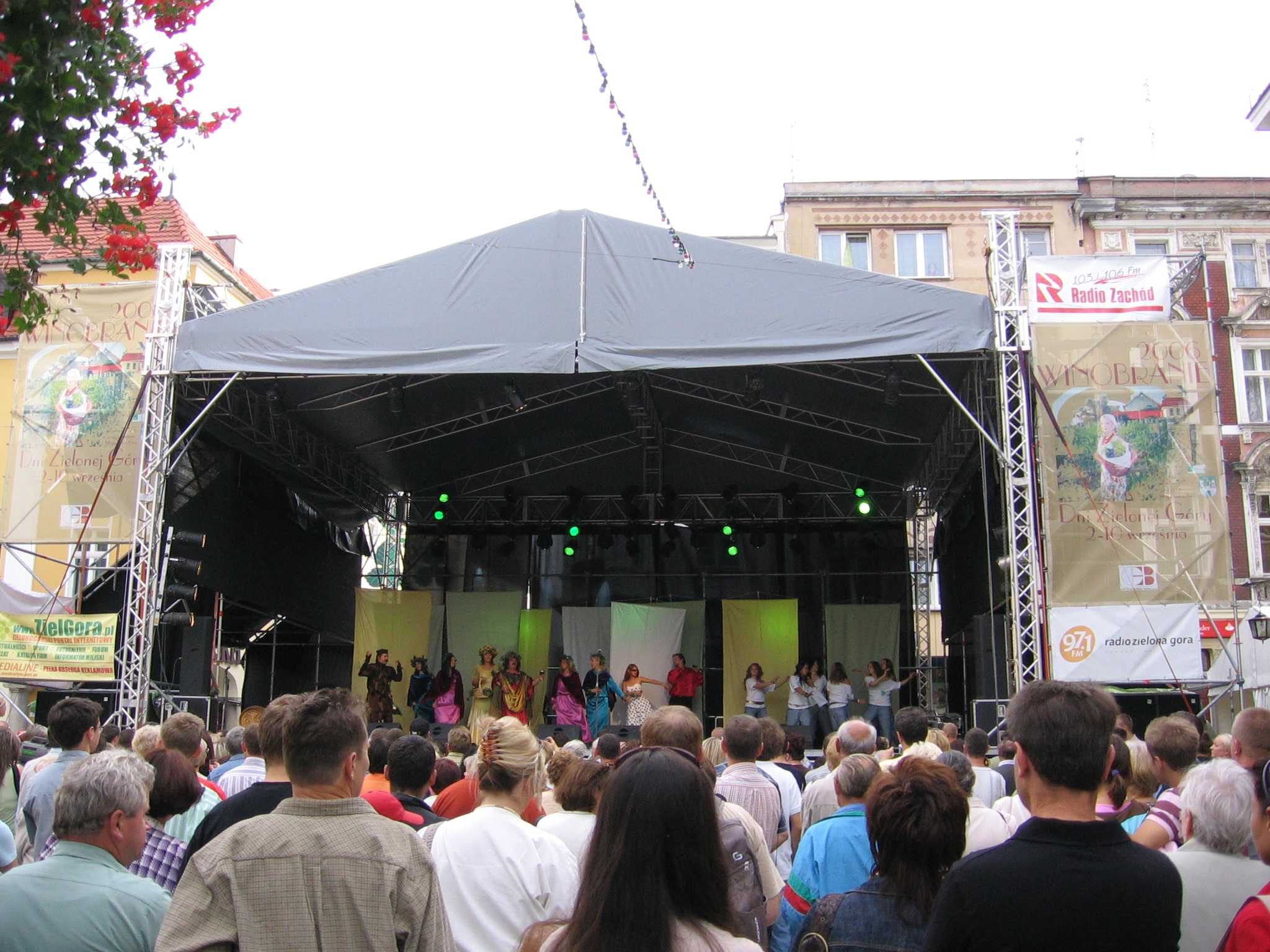 Zielona Góra, scena przy Ratuszu Miejskim